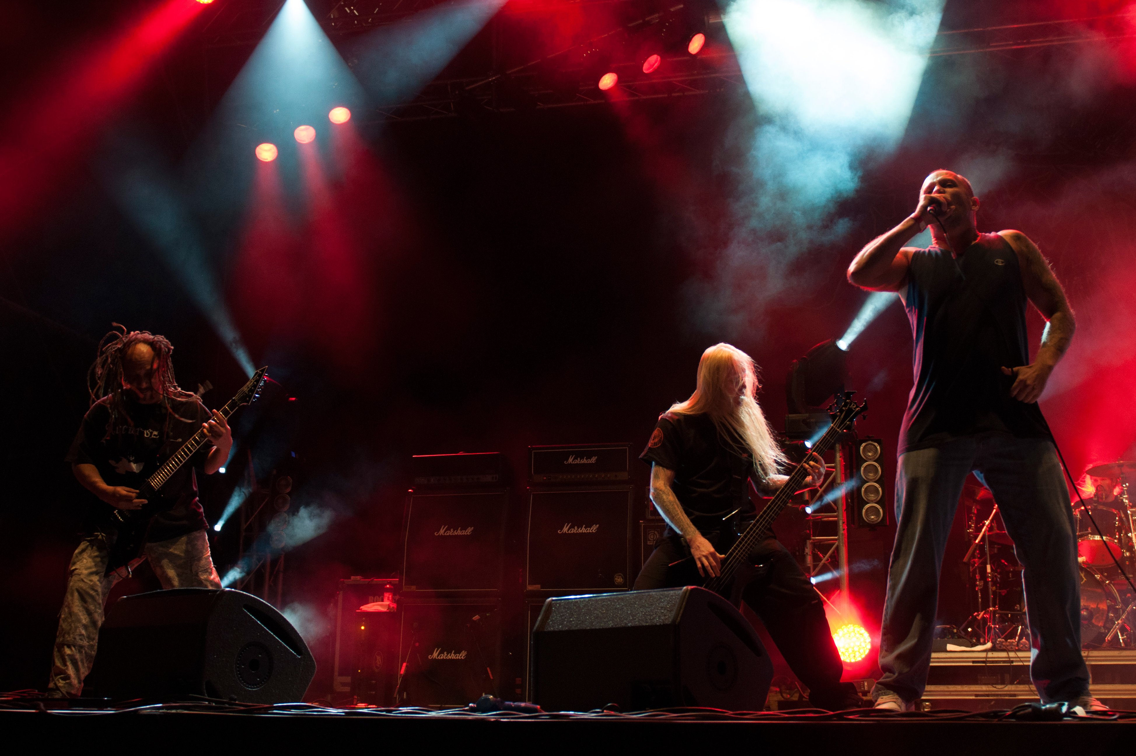 Suffocation at Party.San Open Air 2014